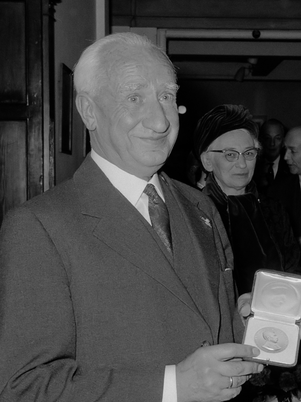 Generaal Snijderspenning voor professor doktor Jacob Jongbloed (l.) 16 december 1965